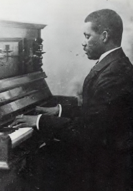 Johannes Nicolaas Helstone, geboren 1853 war ein surinamischer Pianist, Organist, Dirigent und Komponist